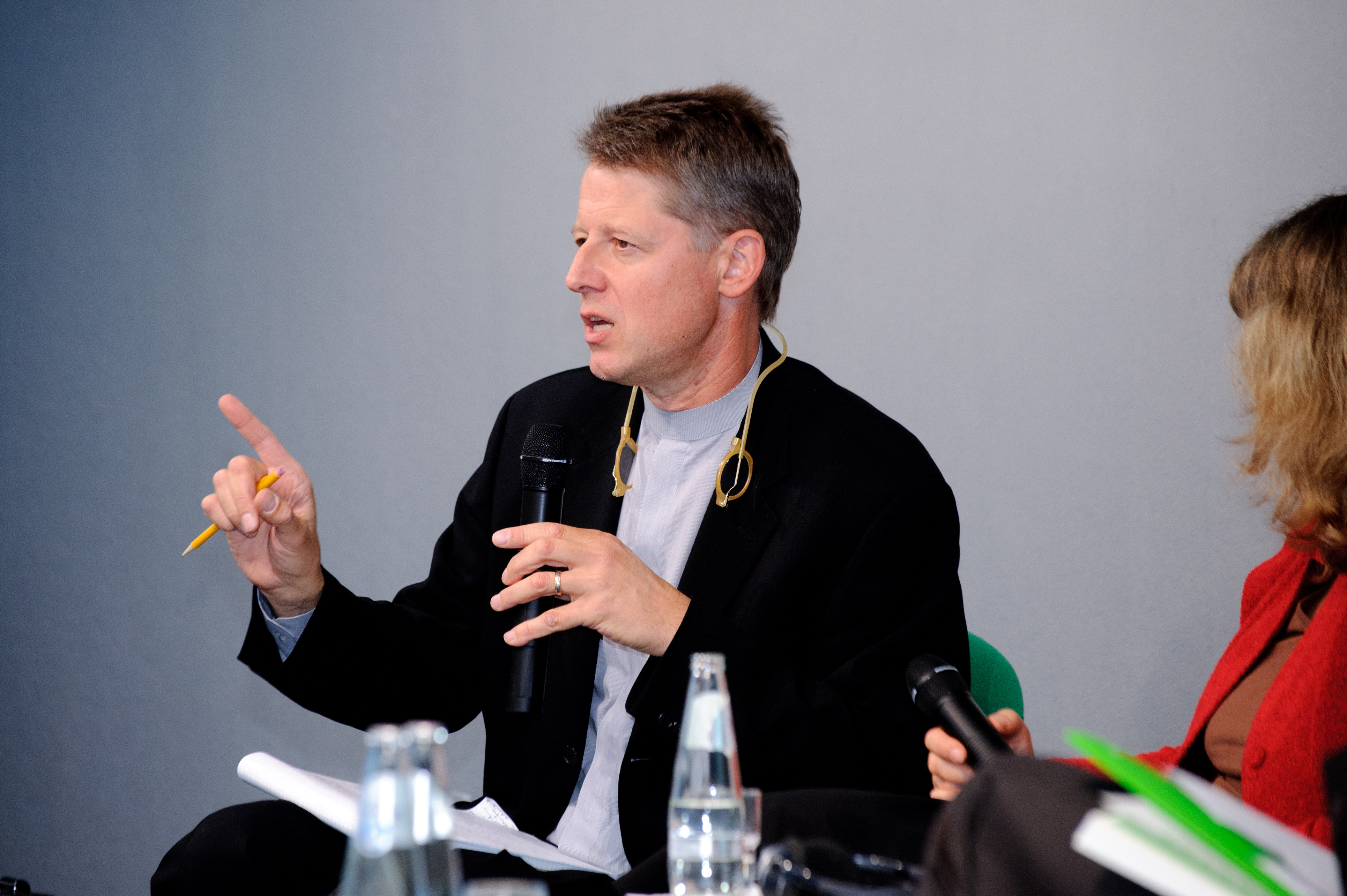 Prof. Andrew Moravcsik (Princeton University) - Konferenz: Solidarität und Stärke - Zur Zukunft der Europäischen Union